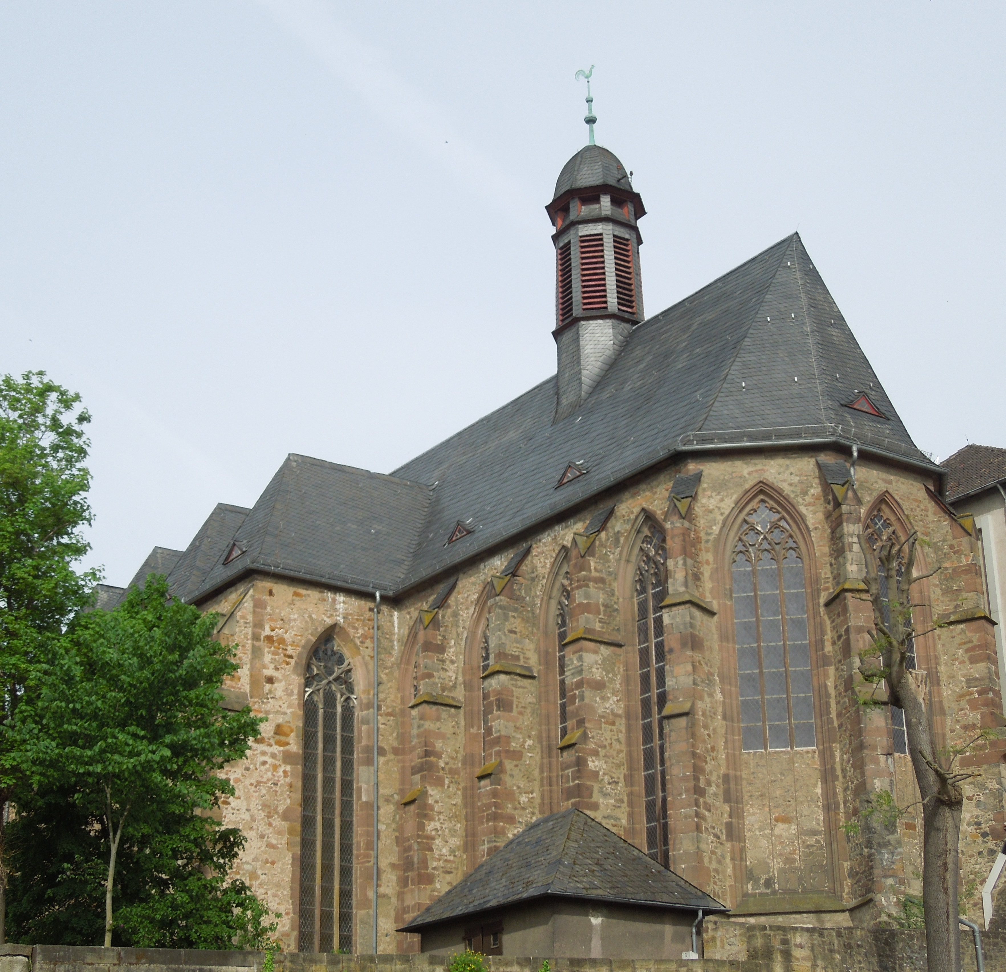 Die Kirche des ehemaligen Minoritenklosters, heute evangelische Stadtkirche von Fritzlar